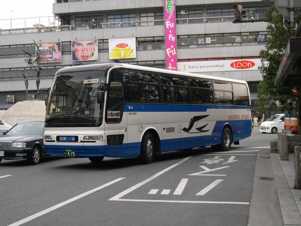 姫路駅前にて撮影